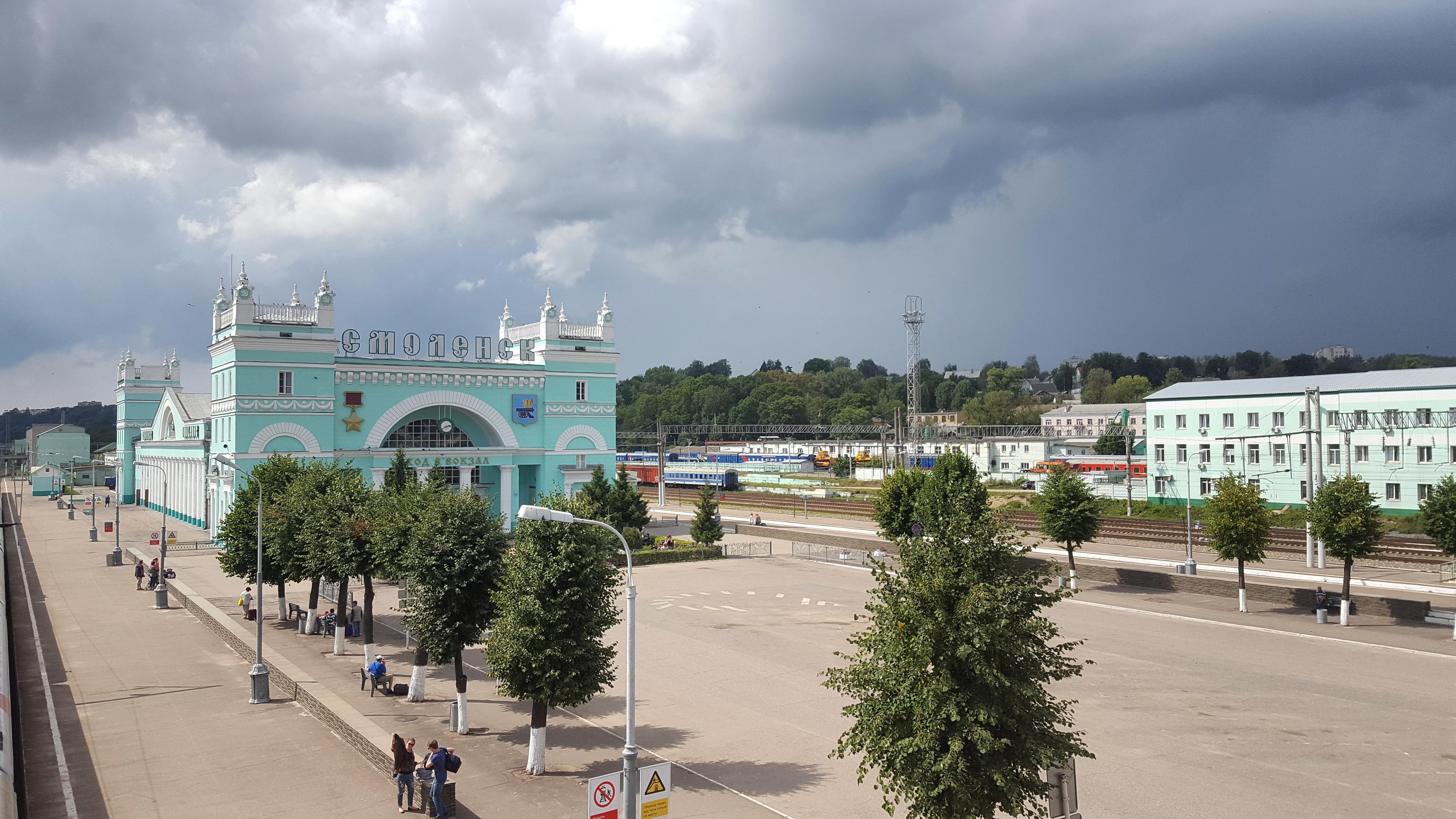 Здание железнодорожного вокзала (старое здание), в котором перед трудящимися Смоленска выступали советские государственные, партийные деятели: площадь Привокзальная, Смоленск, Смоленский район, Смоленская область